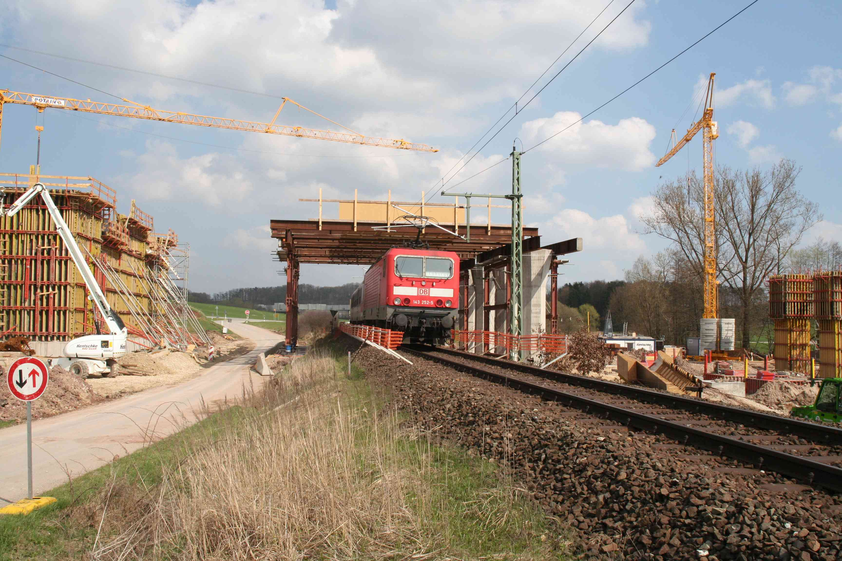 Füllbachtalbrücke Bundesautobahn A73 Ebersdorf b. Coburg